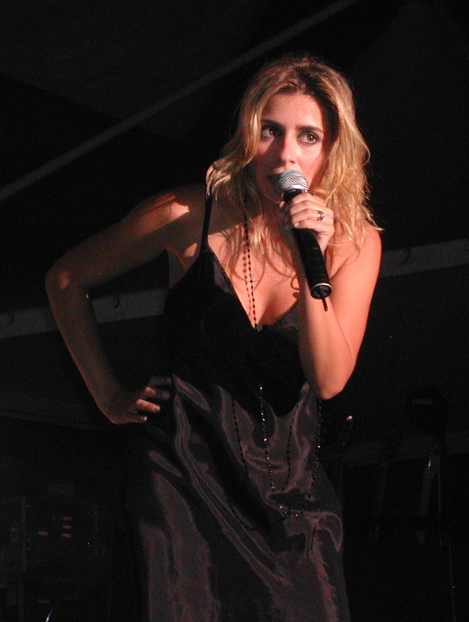 Julie Zenatti durant un concert à la Réunion en octobre 2005